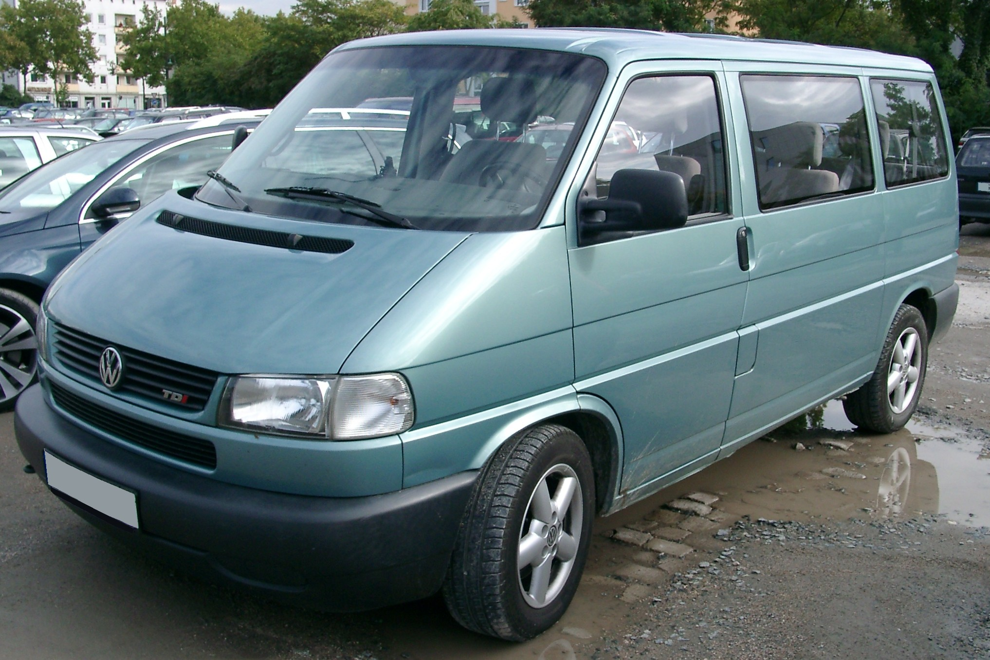 VW Bus (T4)